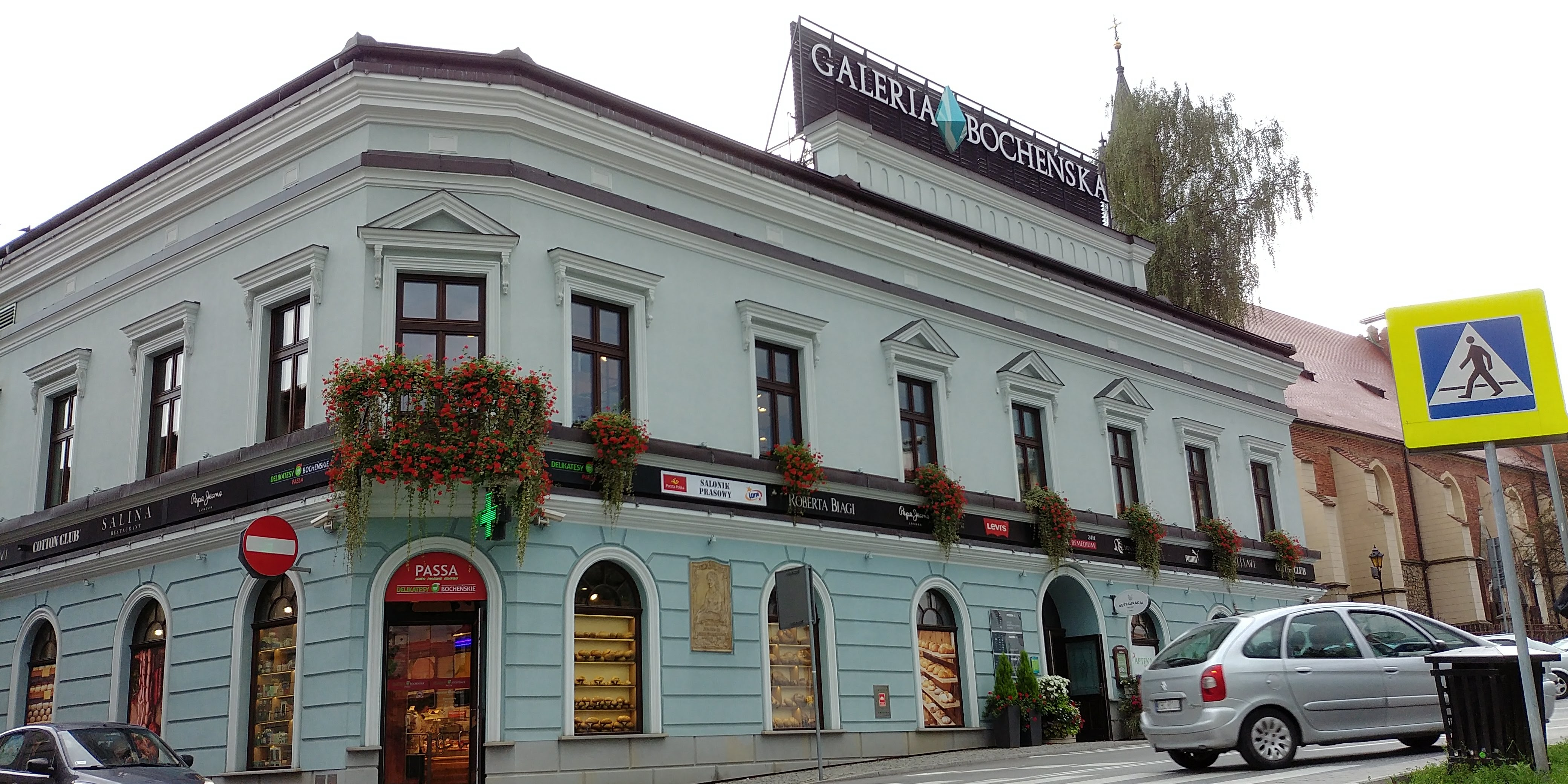 Galeria Bocheńska.